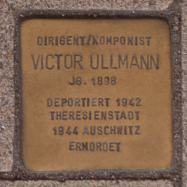 Stolperstein für Viktor Ullmann vor der Hamburgischen Staatsoper in Hamburg-Neustadt.